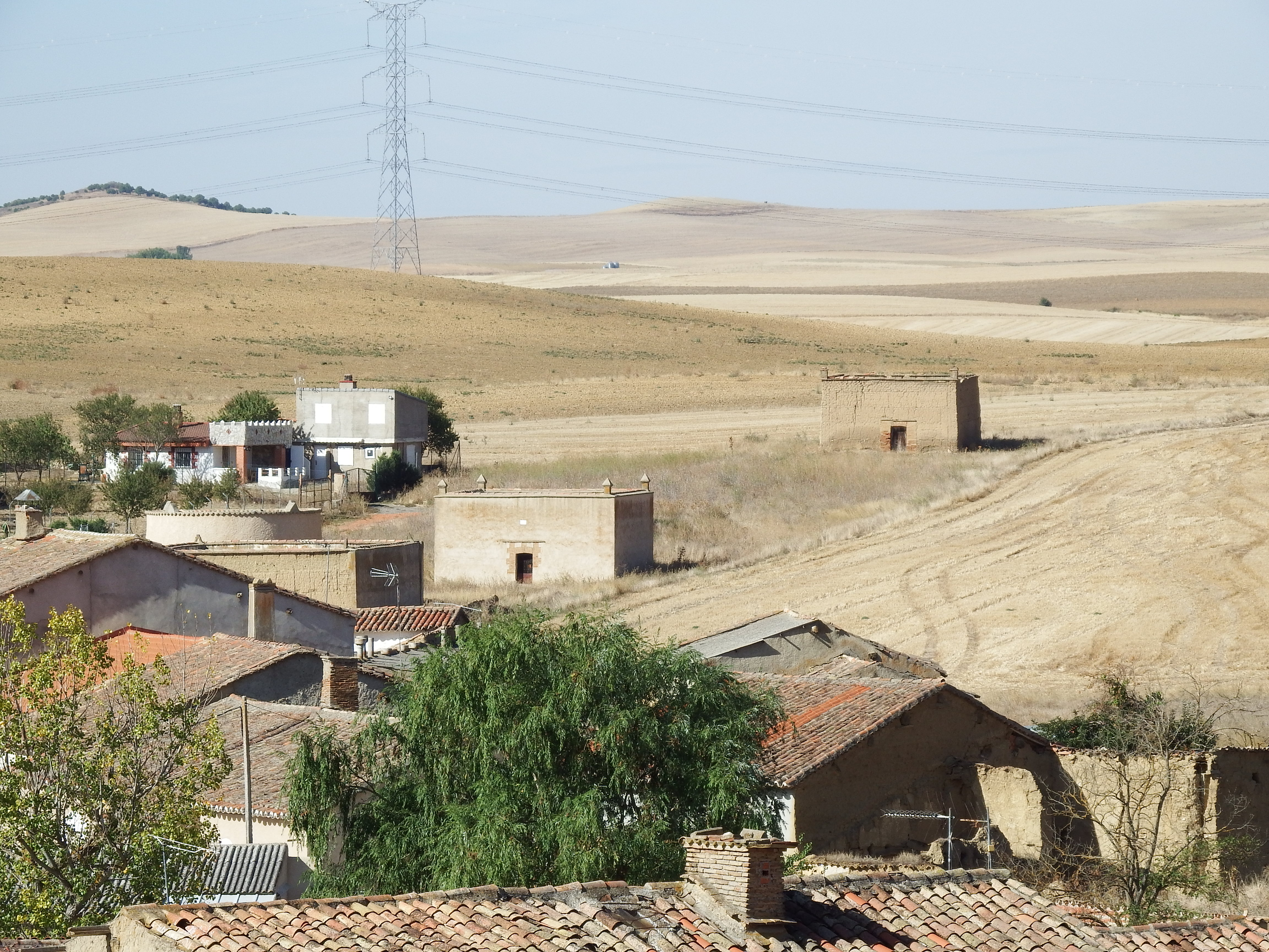 Abezames